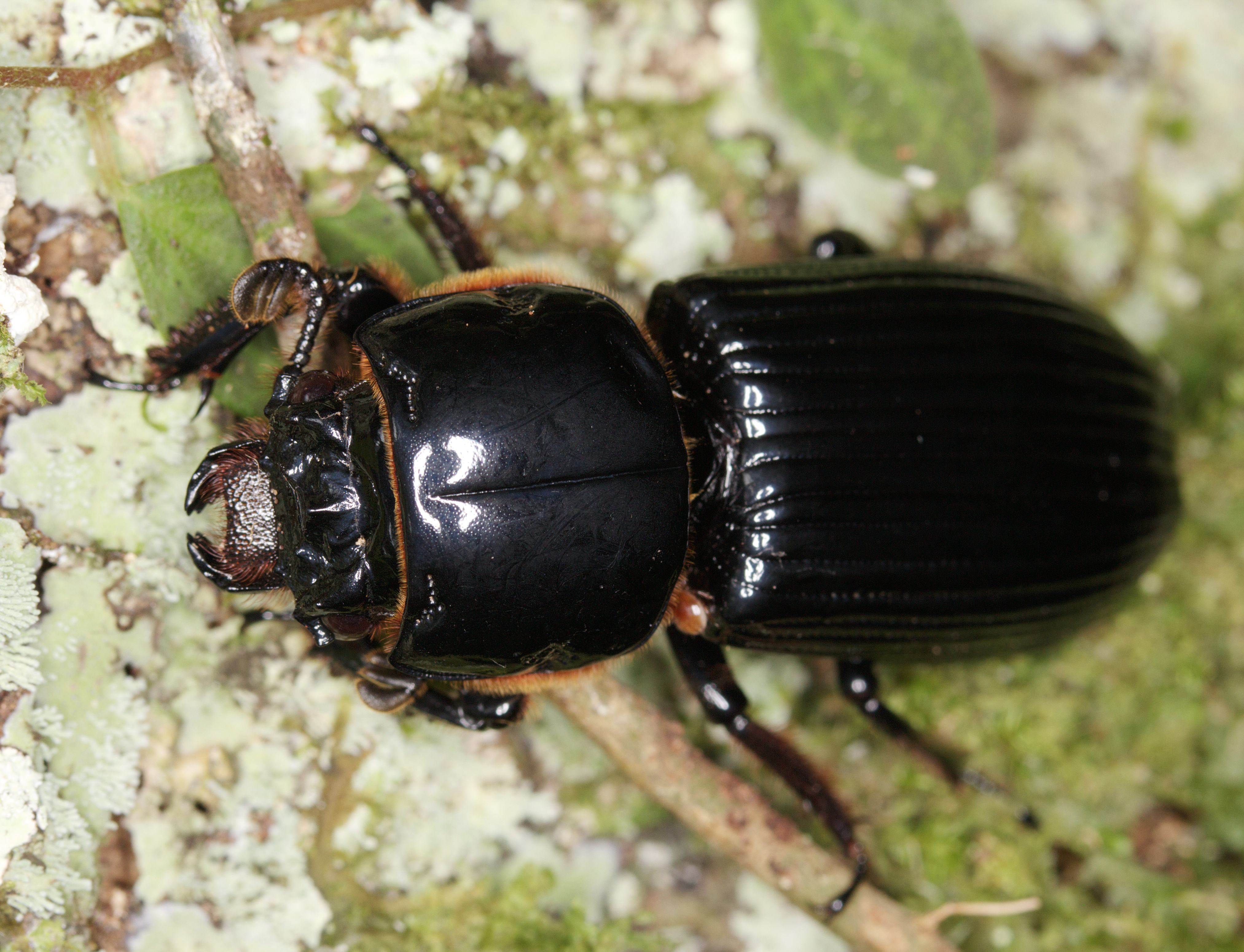 betsy beetle